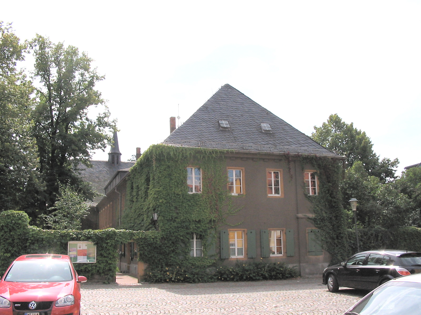 Pfarrhaus in Kötzschenbroda, vom Anger aus